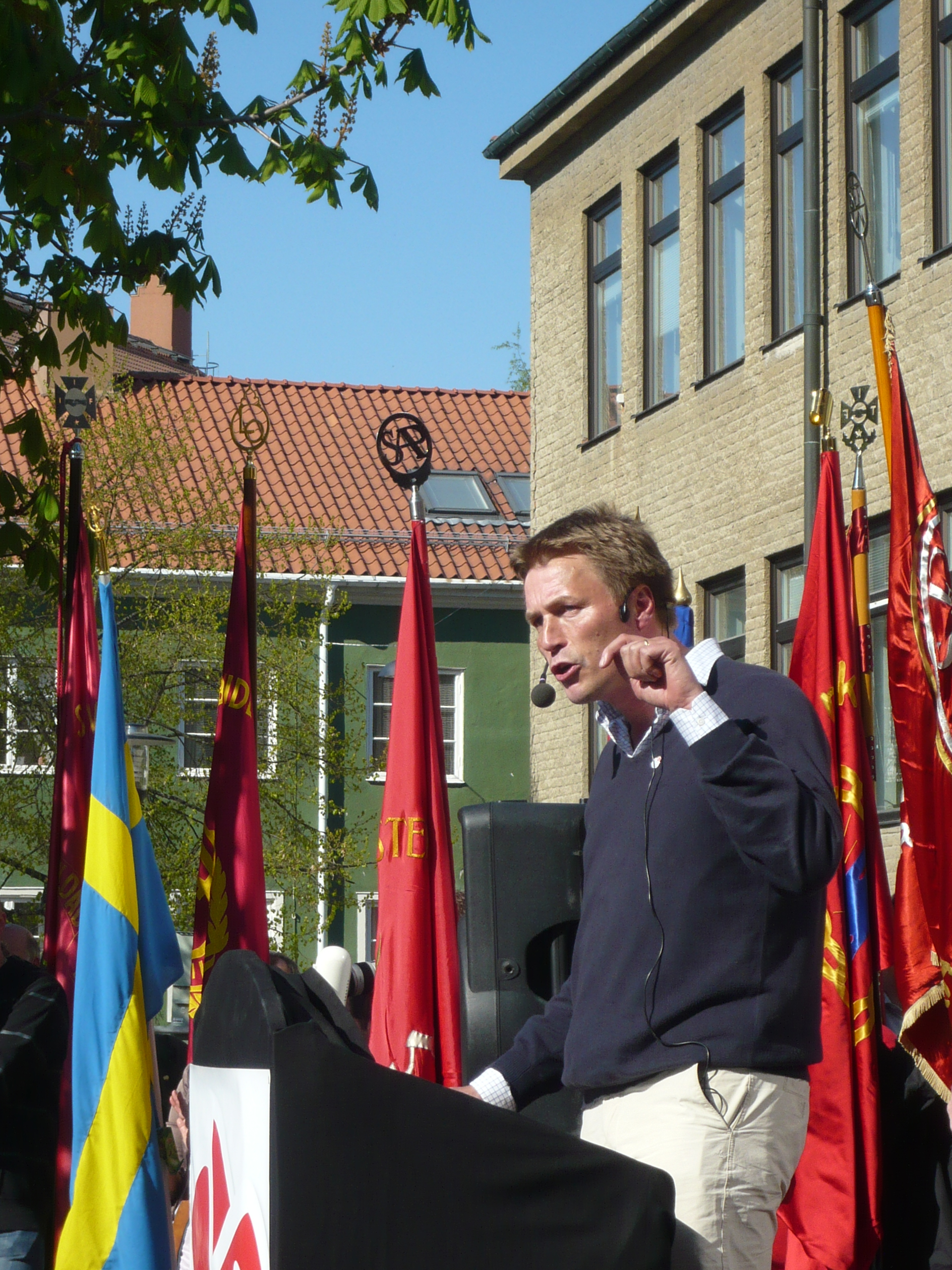 Thomas Bodström håller 1 maj-tal i Västerås 2009.